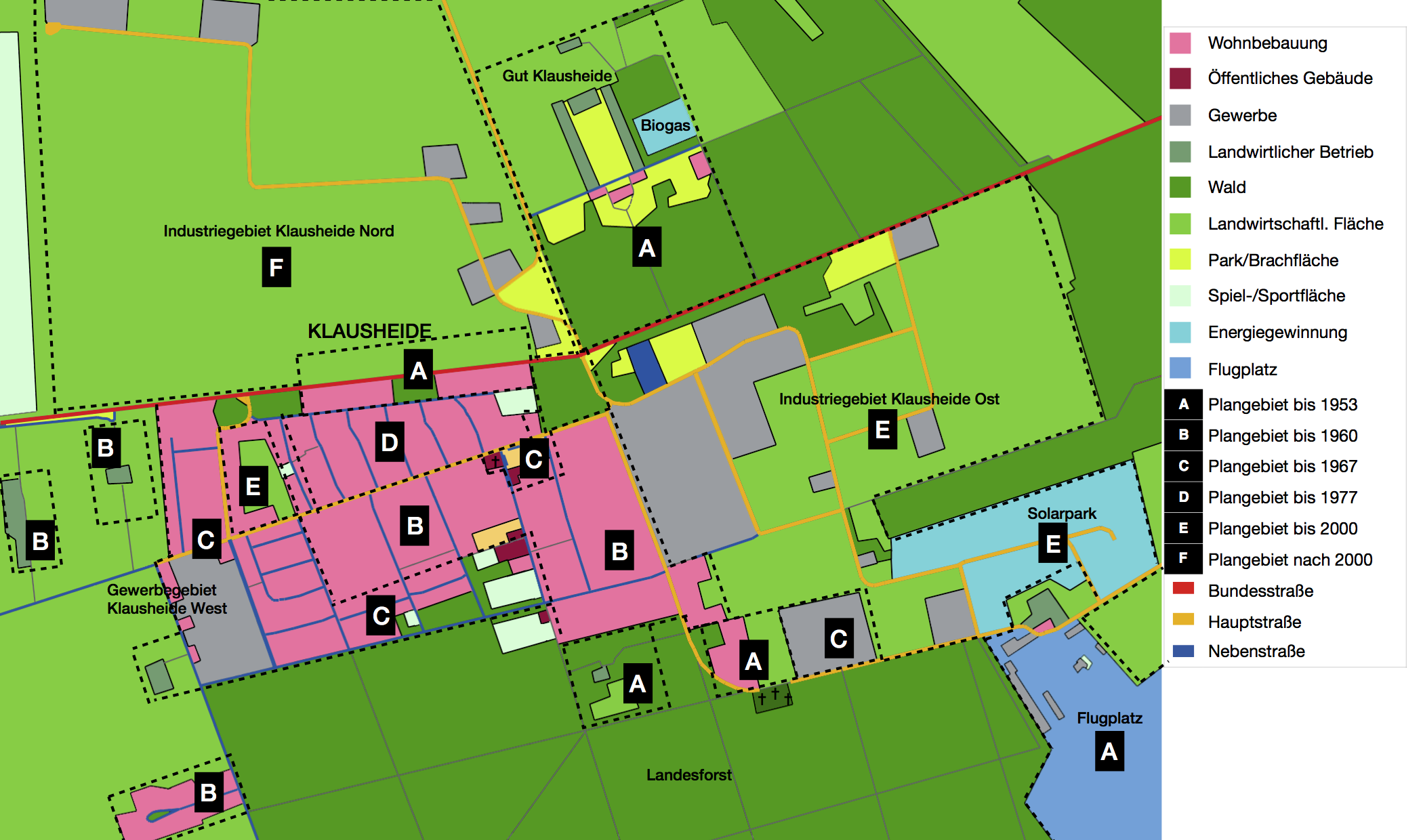 Plangebiete von Klausheide, Landkreis Grafschaft Bentheim